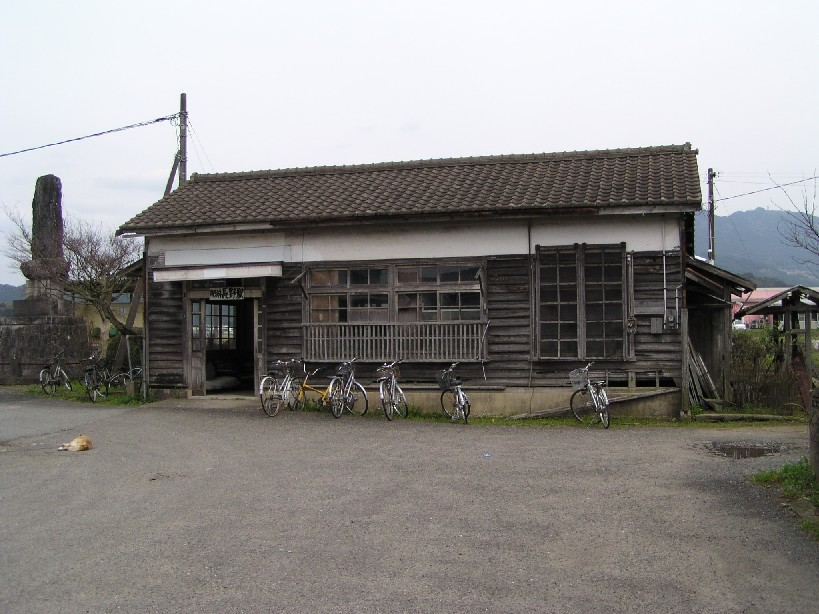 2005/03/26に投稿者が肥前長野駅にて撮影